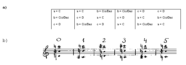 Permutatsioon muusikas. Omavahel sama heliklassilise koostise tõttu suguluses olevad 6 kolmehelilist akordi: a) kolmehelilise rühma C, Cis/Des ja D kuus erinevat järjestust, b) kuus kolmehelilist akordi, mis koosnevad samadest heliklassidest